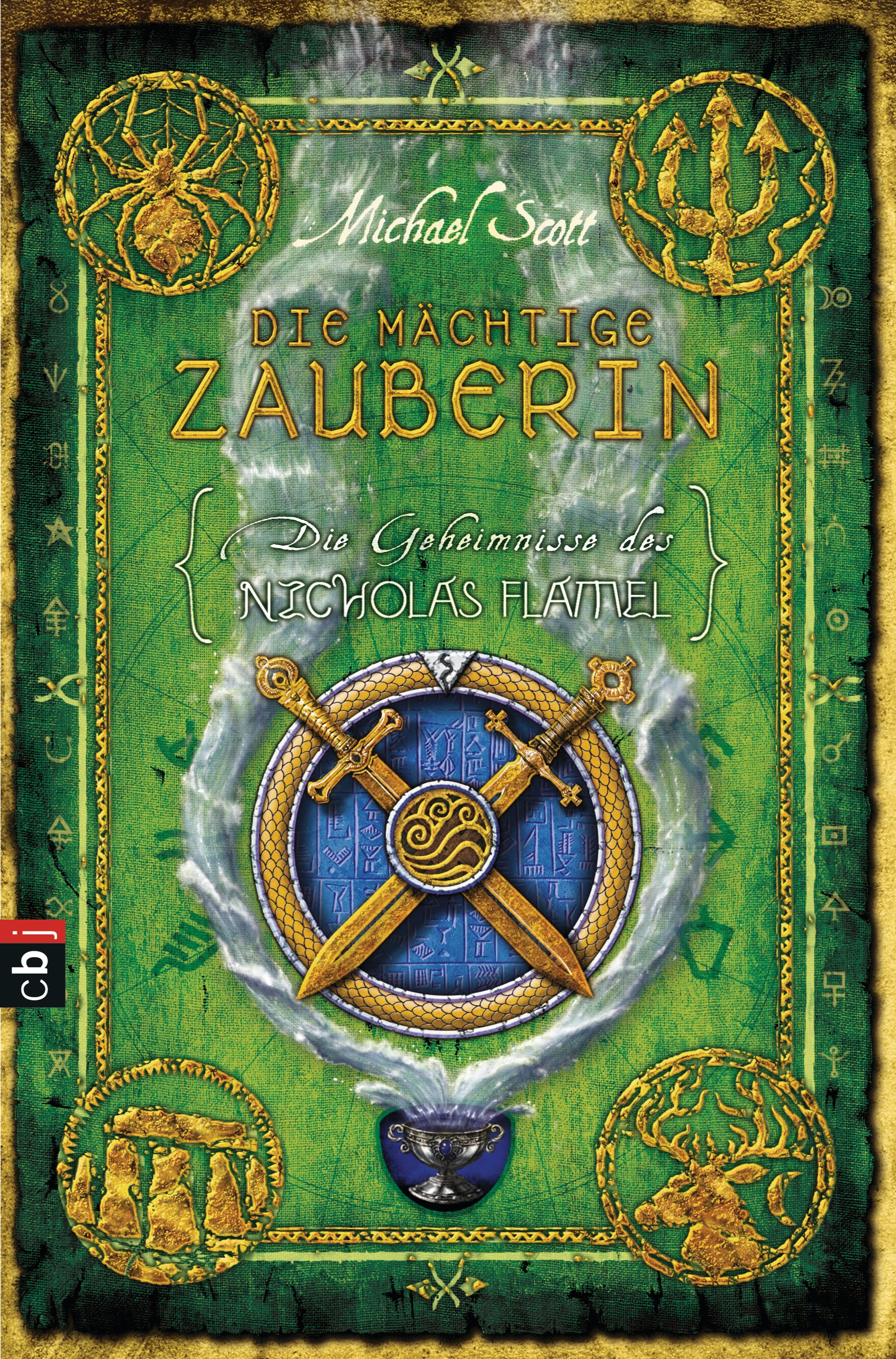 Michael Scott: Die Geheimnisse des Nicholas Flamel. Die mächtige Zauberin. cbj, München 2010. DNB